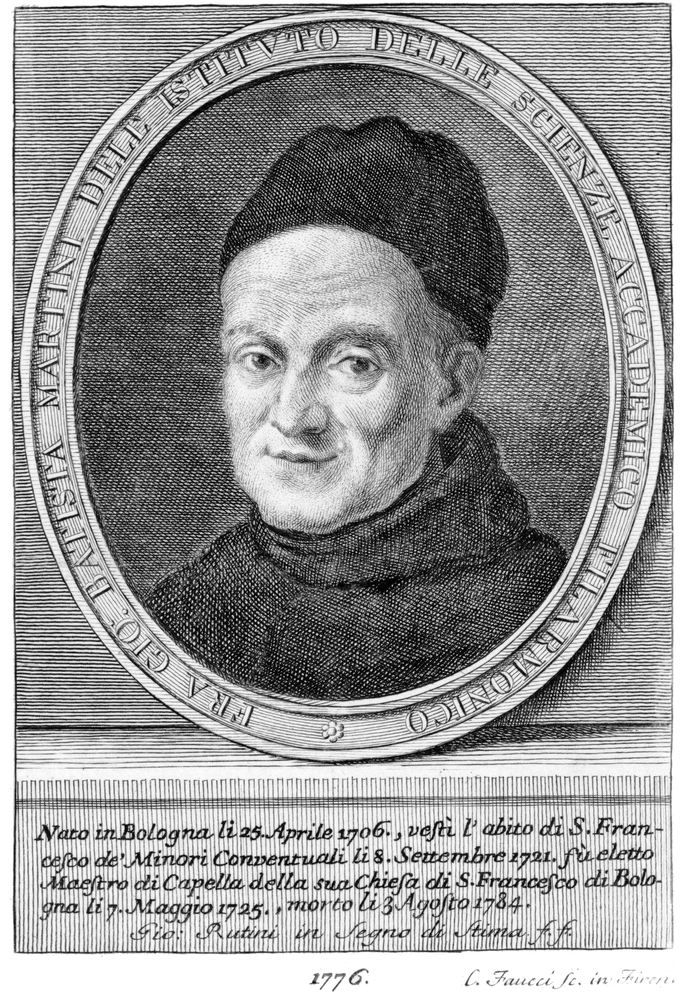 Depicted person: Giovanni Battista Martini